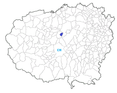 Posizione del comune nella provincia di Cuneo